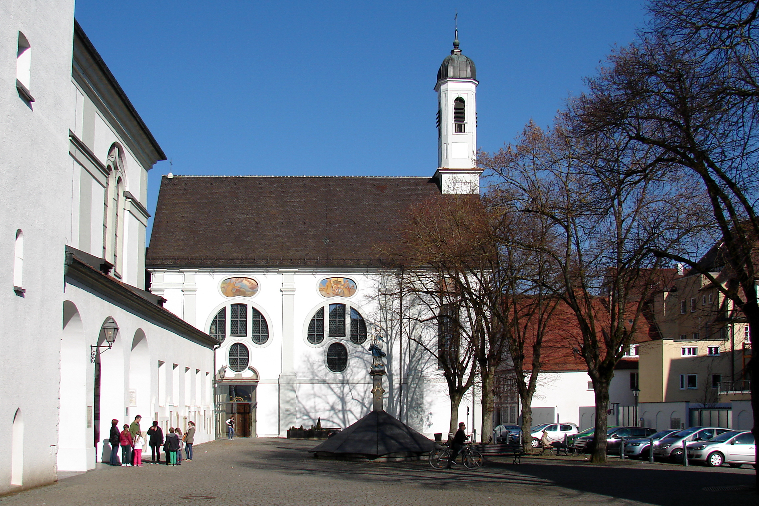 Die Klosterkirche Mariä Himmelfahrt ist die Kirche des Mutterhauses der Dillinger Franziskanerinnen in Dillingen an der Donau im bayerischen Regierungsbezirk Schwaben und gehört zur Diözese Augsburg. Sie wurde im 18. Jahrhundert nach Plänen von Johann Georg Fischer im Stil des frühen Rokoko gebaut.